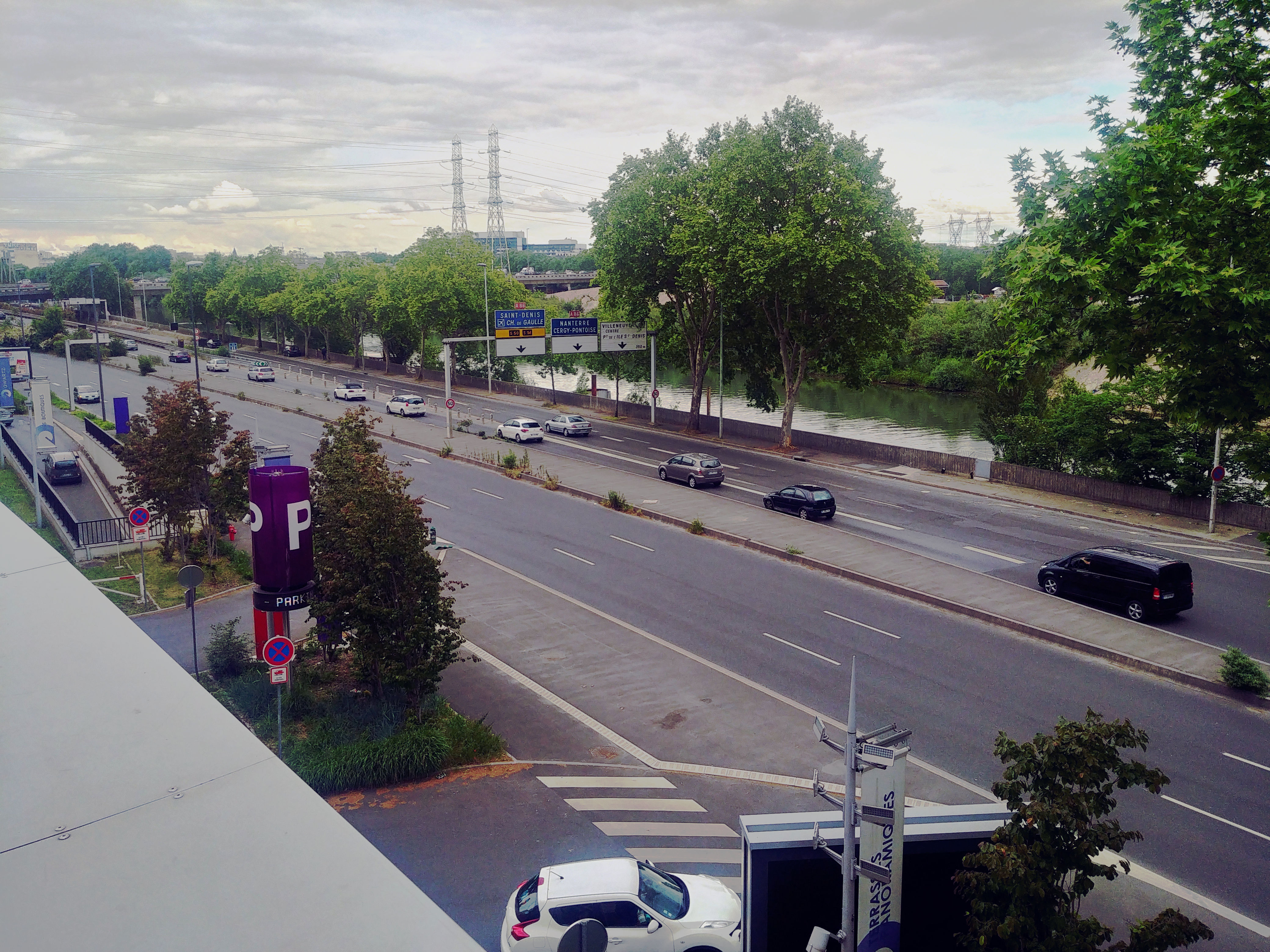 Quai de Seine depuis le centre commercial Qwartz (Île-de-France)